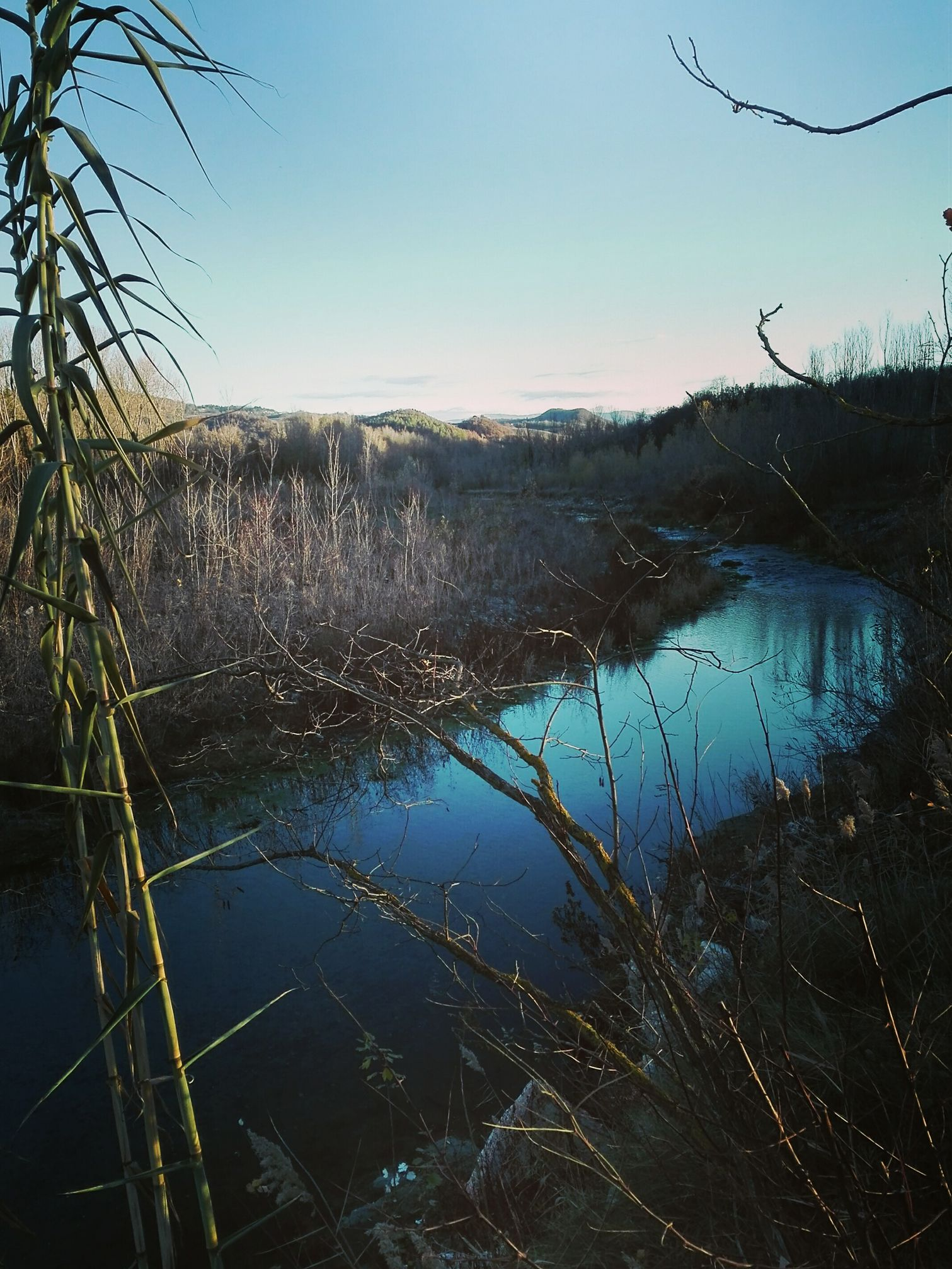 Lo staffora lungo il suo corso una sera d'ottobre a Montalfeo